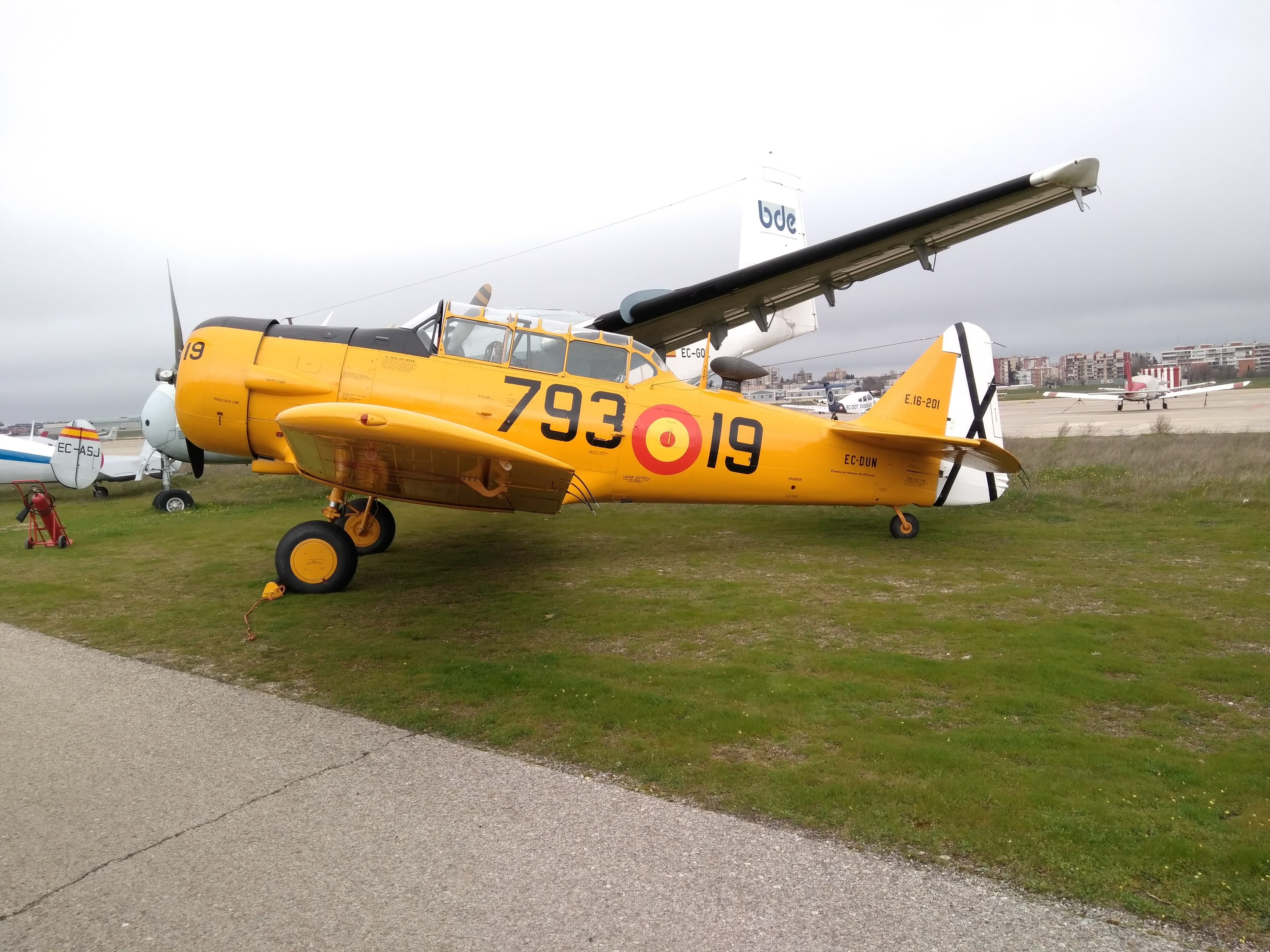 NORTH AMERICAN T-6 TEXAN DUM - 1938 de la Fundacion Infante de Orleans